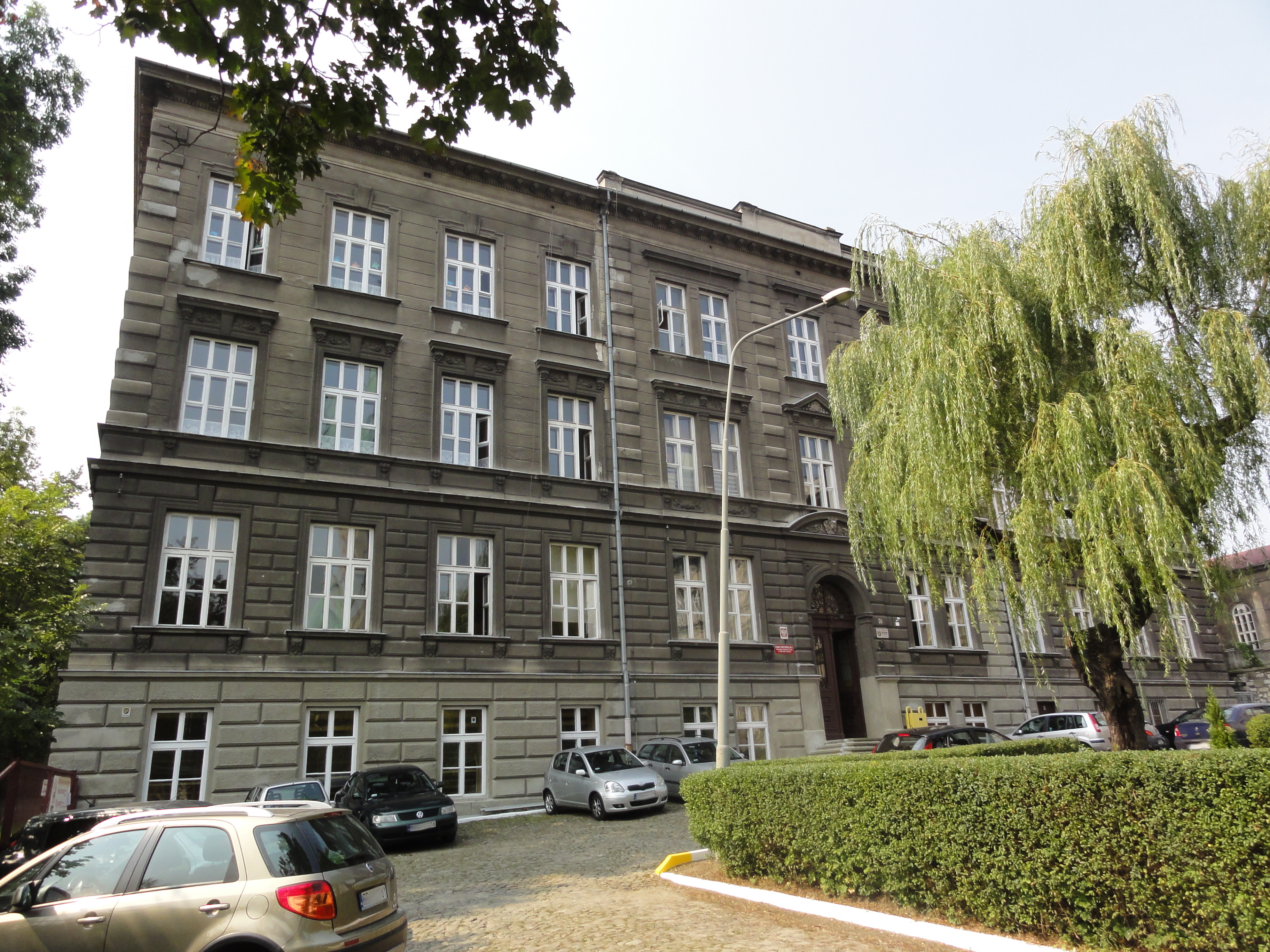 Bielsko-Biała Pl. Lutra 7 SP nr 2 Towarzystwa Szkolnego im. M. Reja